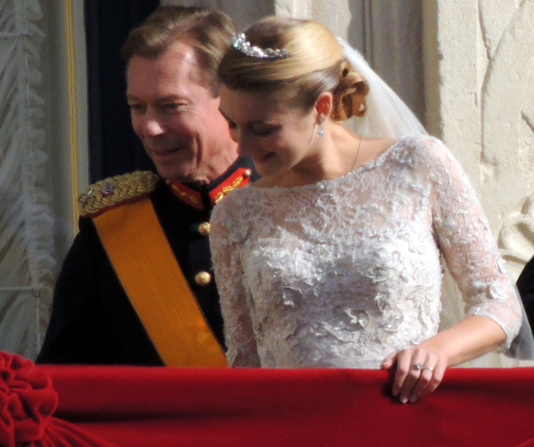 De Grand-Duc mat senger neier Schnauer.